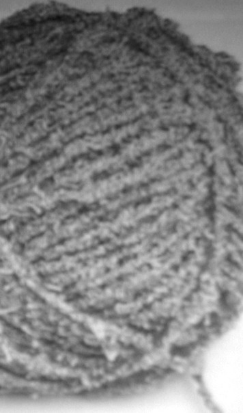 Frottee-Handarbeitsgarn 370 tex aus PES/PAC/PA